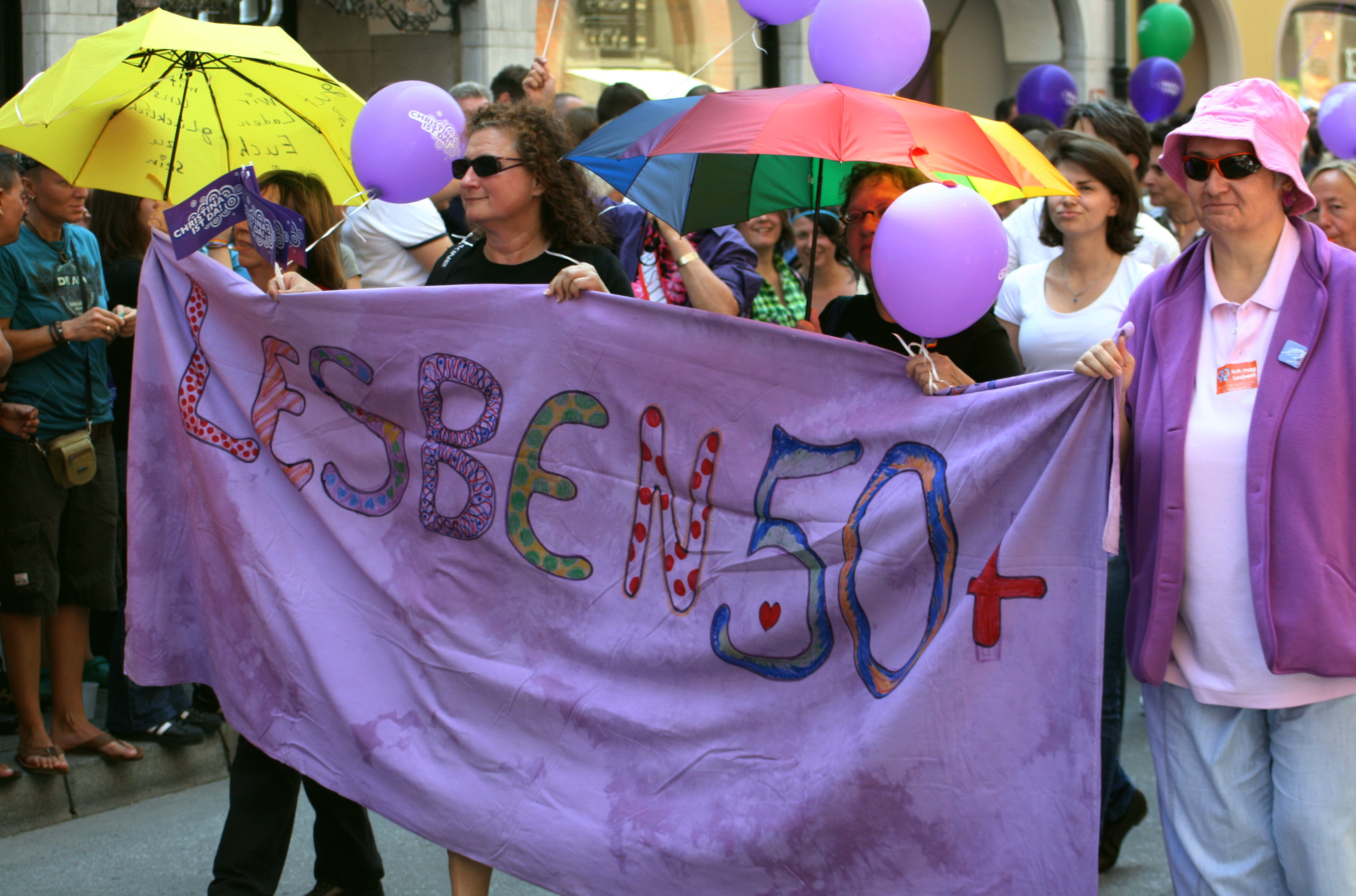 CSD in München 2011